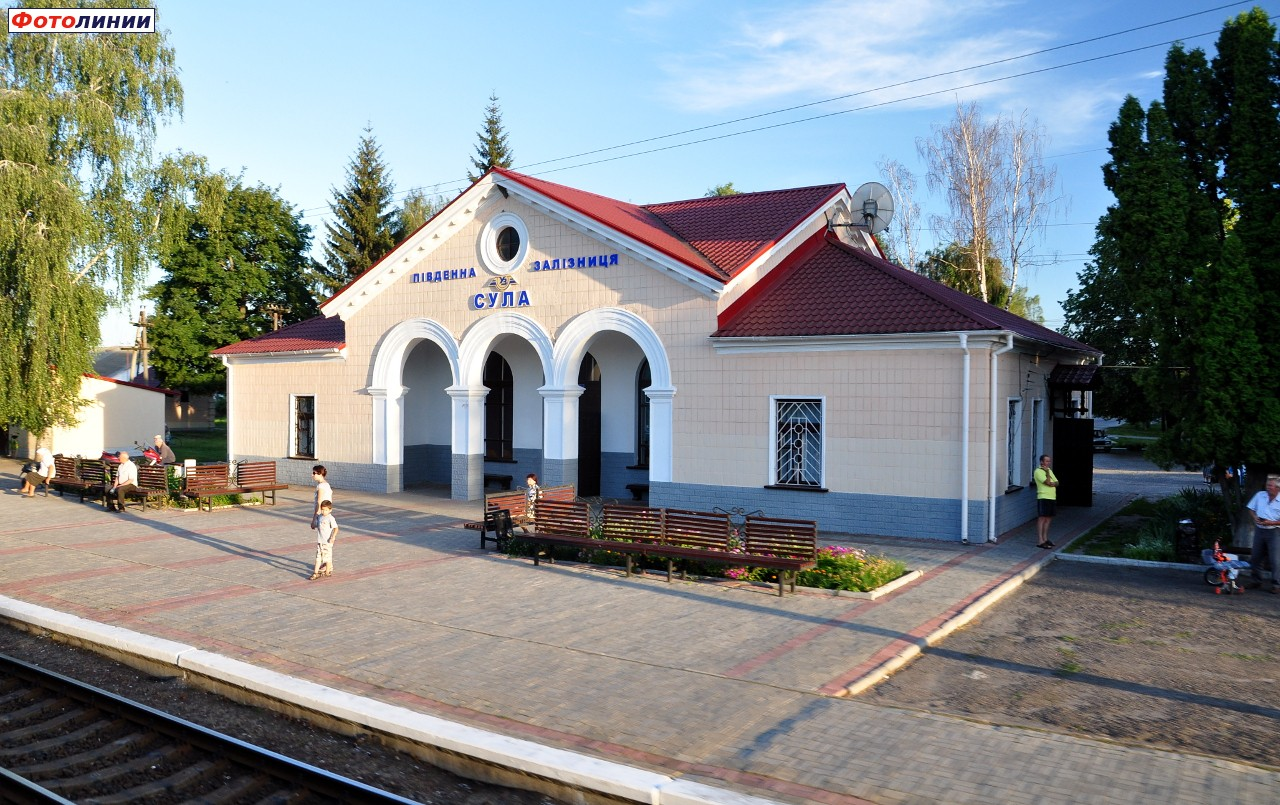 Русиньскый: Станція Сула